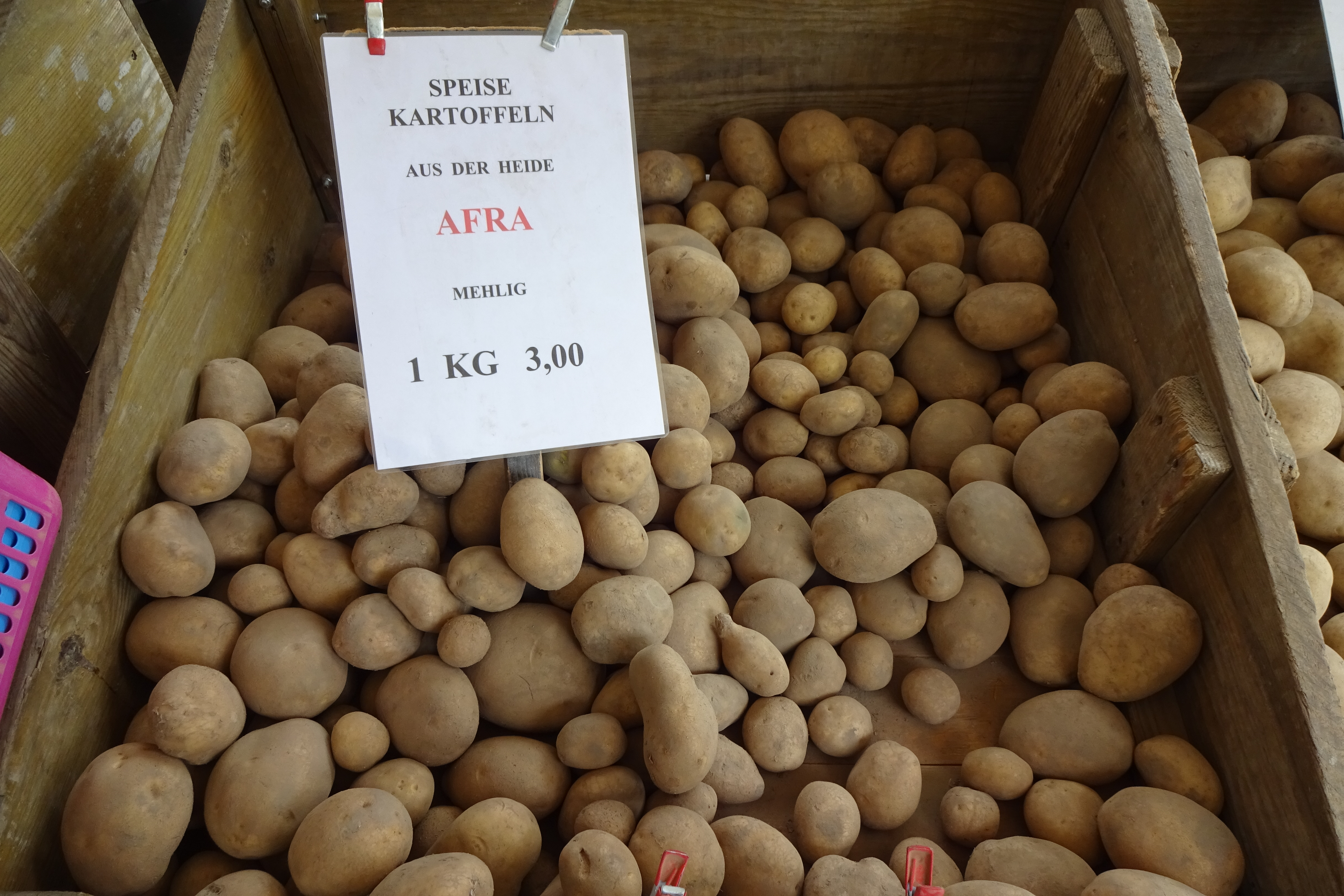 Speisekartoffeln der Sorte 'Afra', mehlig